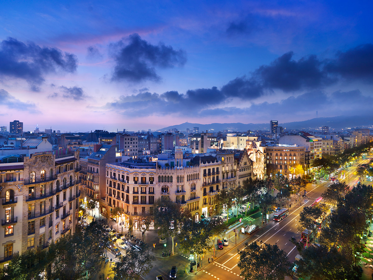 Barcelona Spain